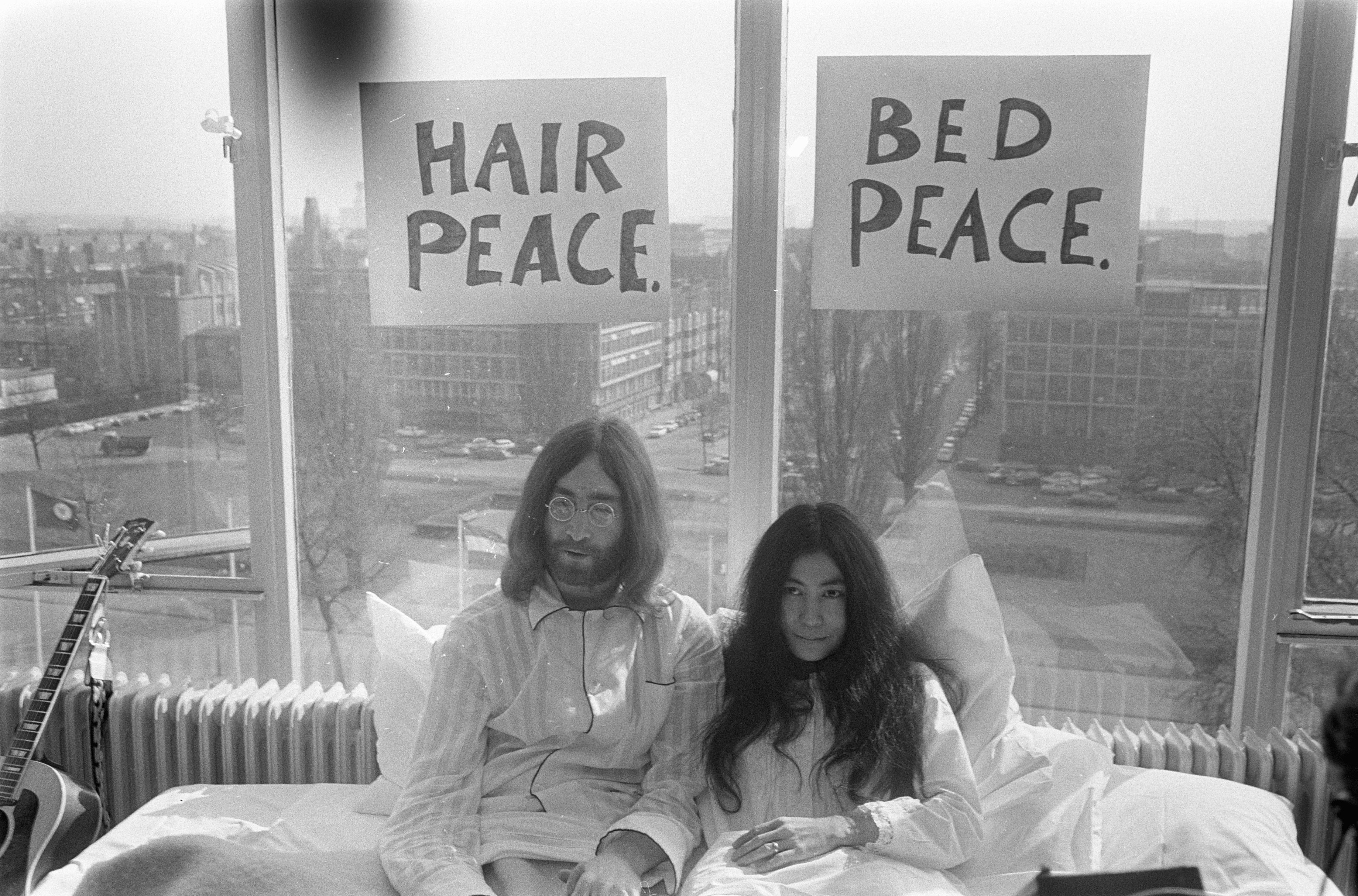 Collectie / Archief : Fotocollectie Anefo Reportage / Serie : [ onbekend ] Beschrijving : John Lennon en zijn echtgenote Yoko Ono op huwelijksreis in Amsterdam. John Lennon en Yoko Ono in bed in het Hilton Hotel Datum : 25 maart 1969 Locatie : Amsterdam, Noord-Holland Trefwoorden : hotels, huwelijksreizen, musici, muziek, zangers Persoonsnaam : Lennon, John, Ono, Yoko Fotograaf : Koch, Eric / Anefo Auteursrechthebbende : Nationaal Archief Materiaalsoort : Negatief (zwart/wit) Nummer archiefinventaris : bekijk toegang 2.24.01.05 Bestanddeelnummer : 922-2315